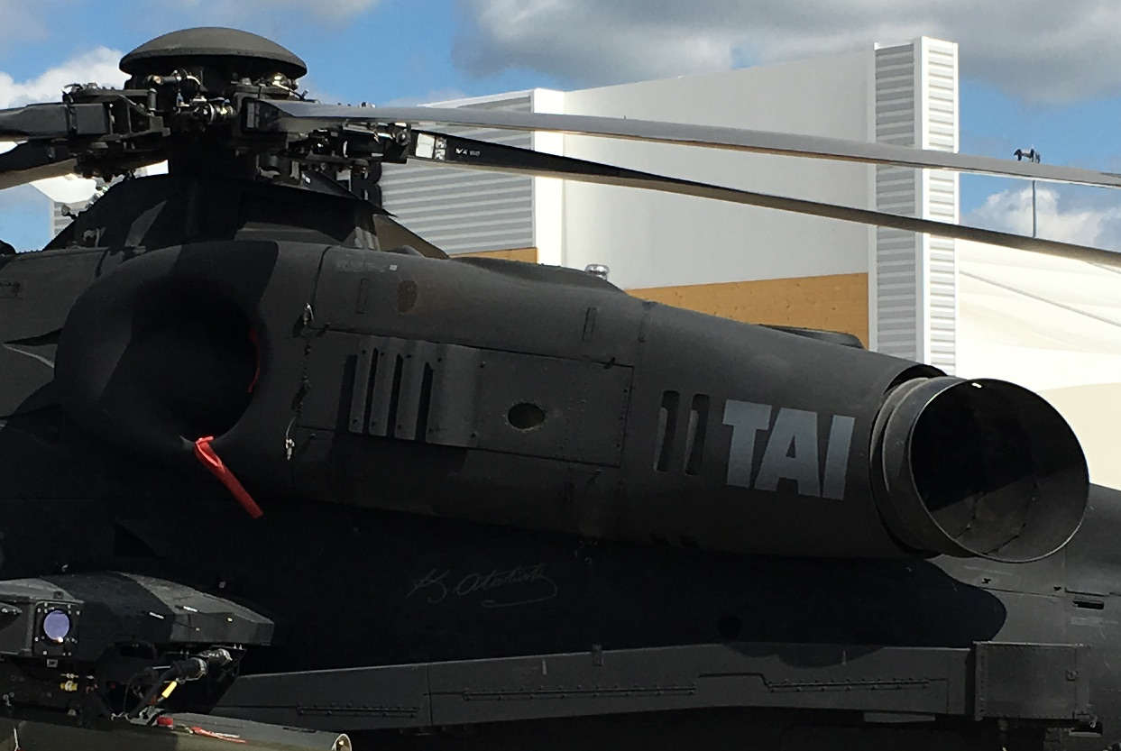 T-129 Atak Salon du Bourget